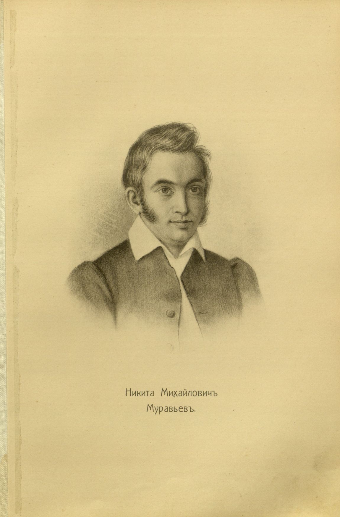 Nikita Mikhailovich Muraviev